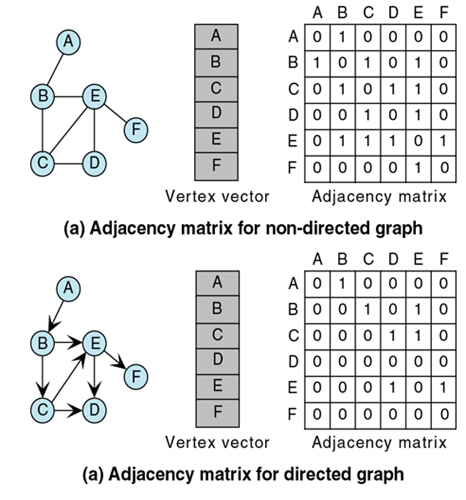 directed and non-directed adjacency graph